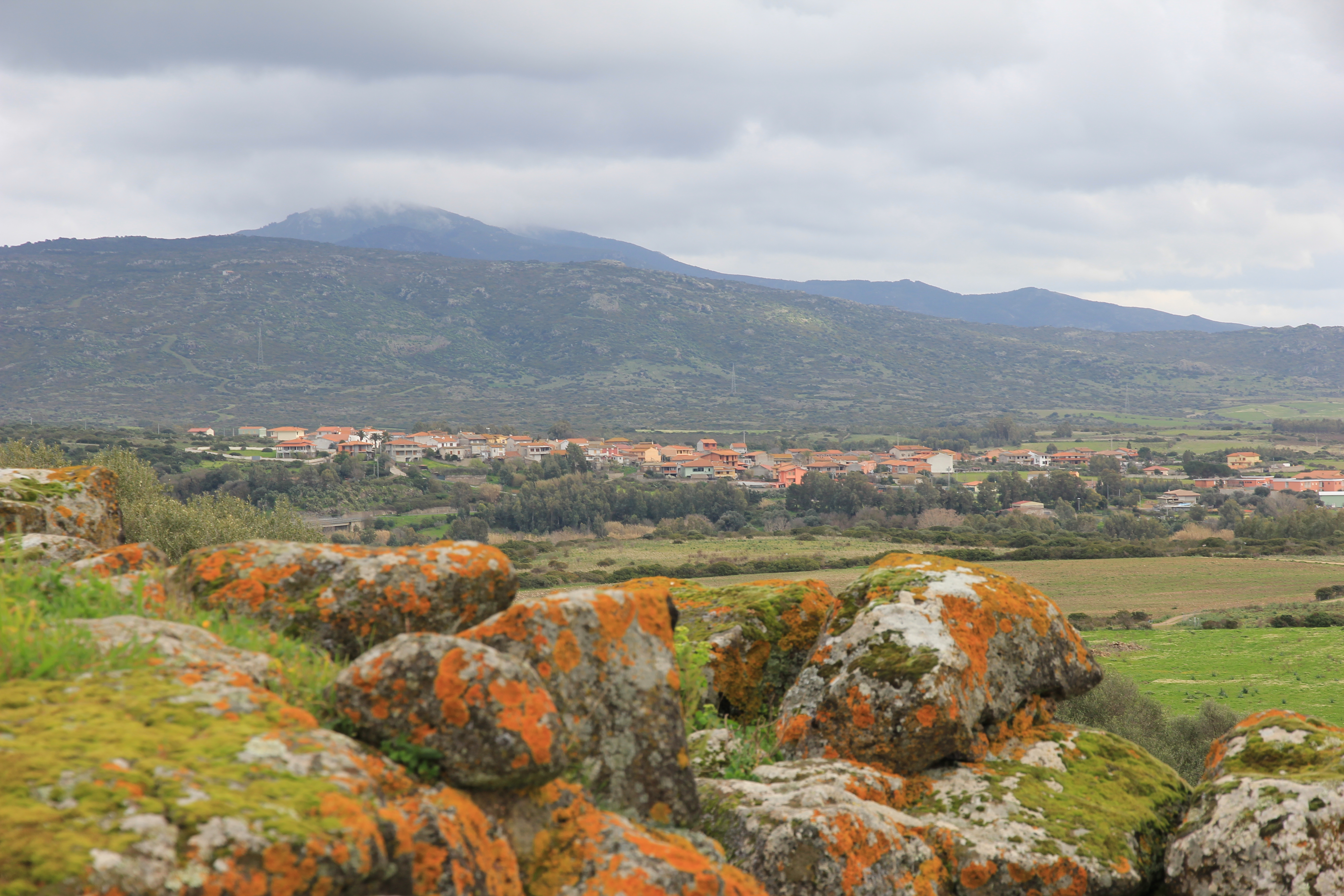 Villanova Truschedu - Panorama